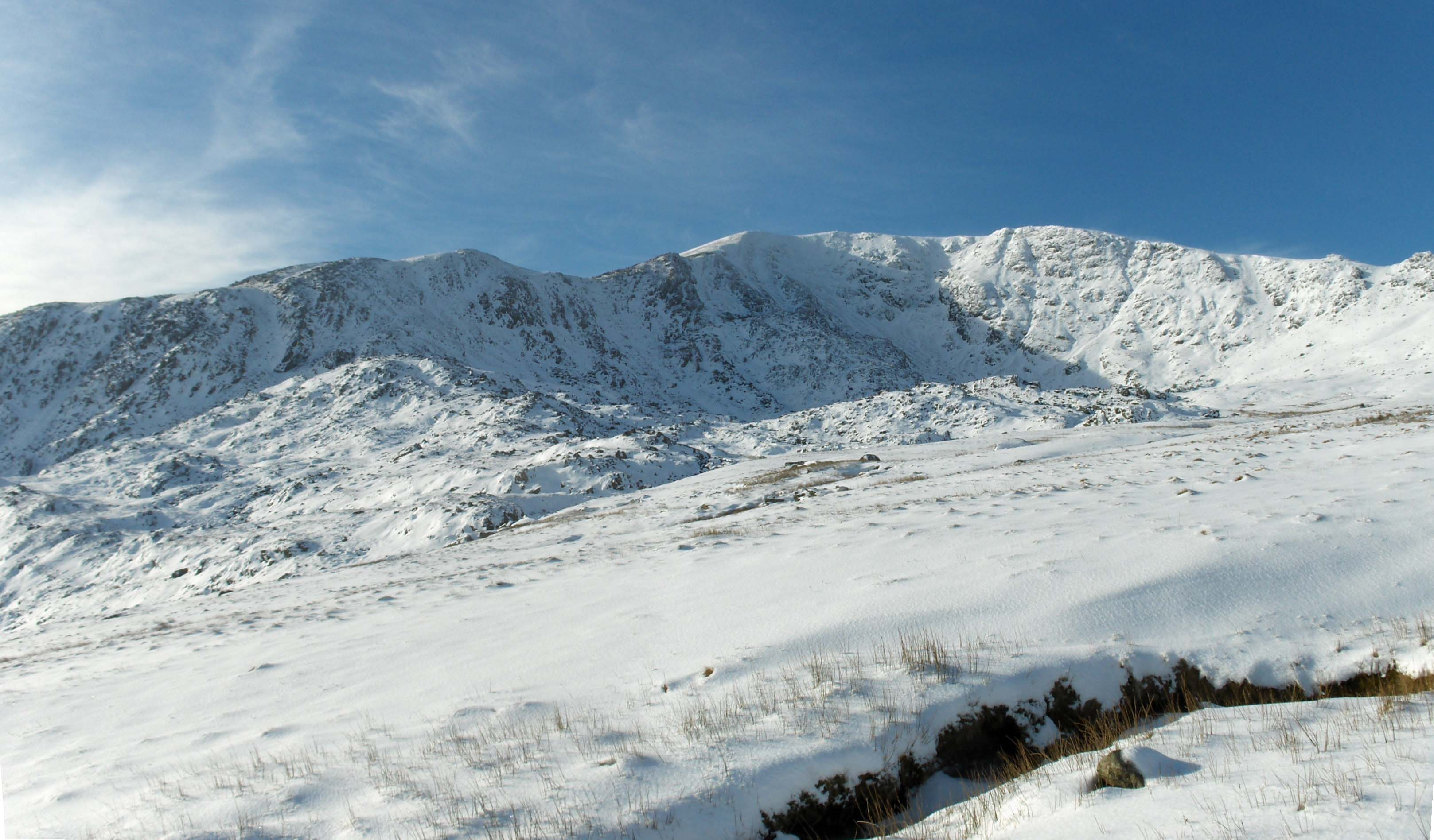 Carnedd Llywelyn (Carnedd Llewelyn) from the southeast in January 2007.